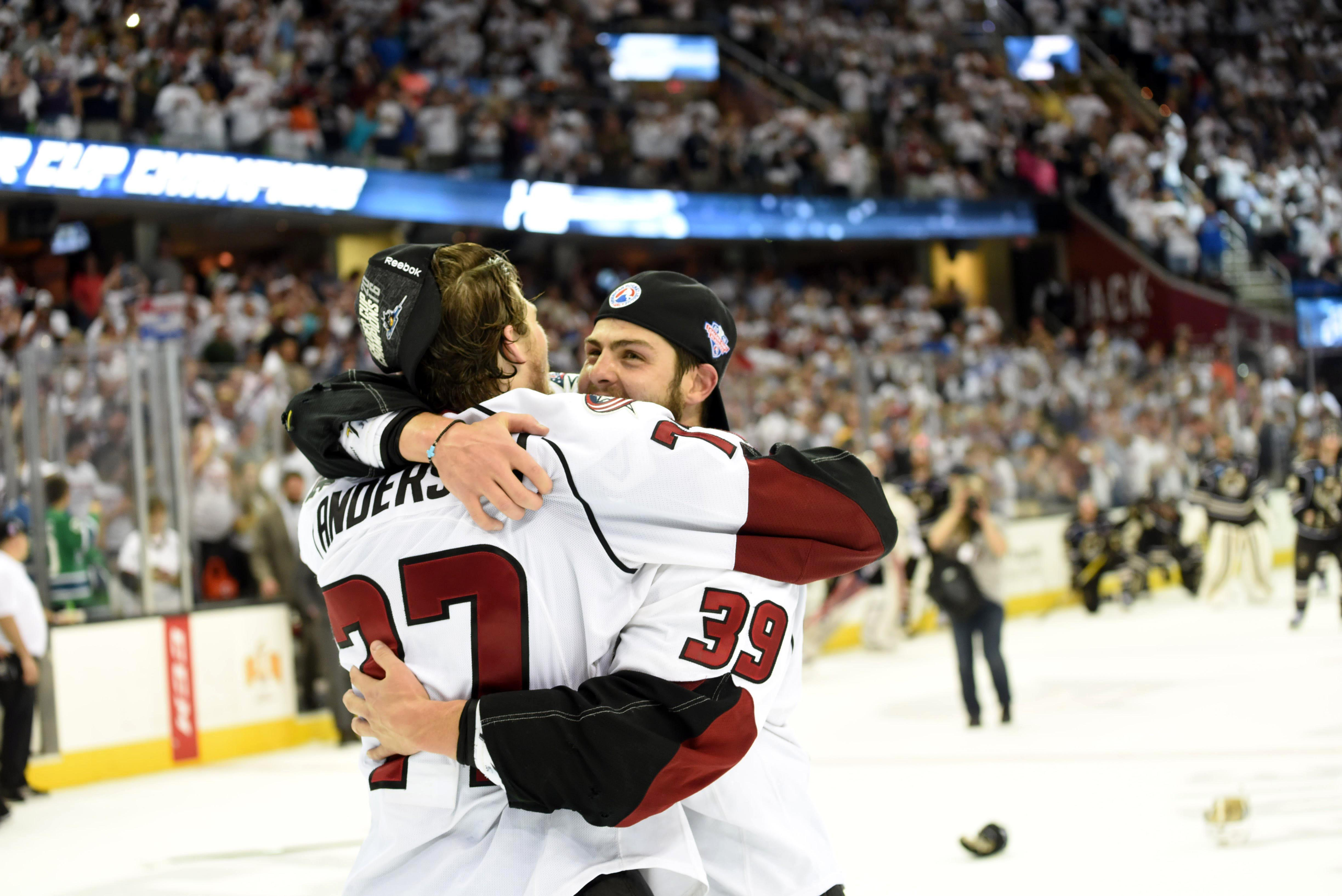 Photo: John Saraya/AHL